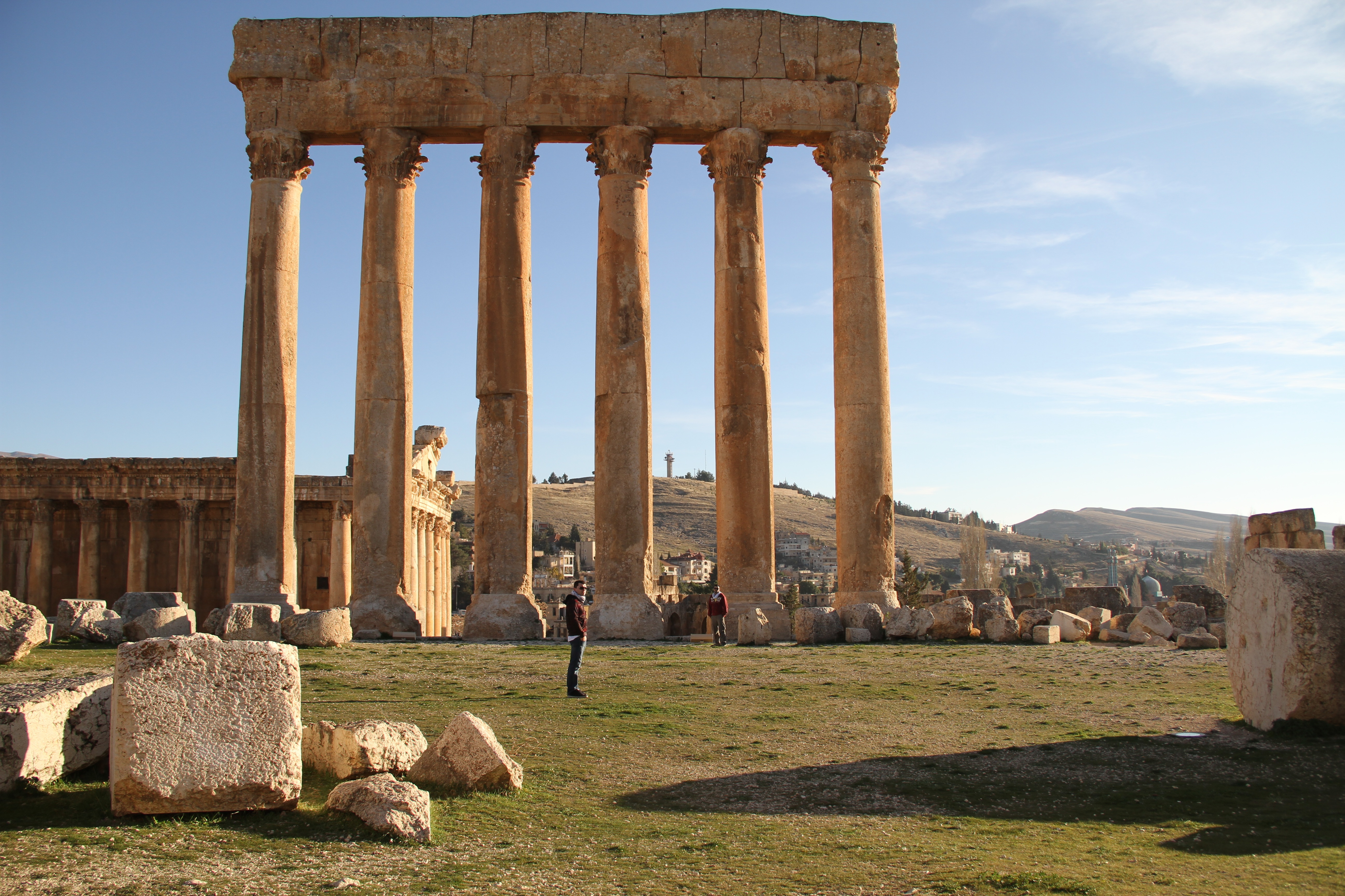 Baalbek